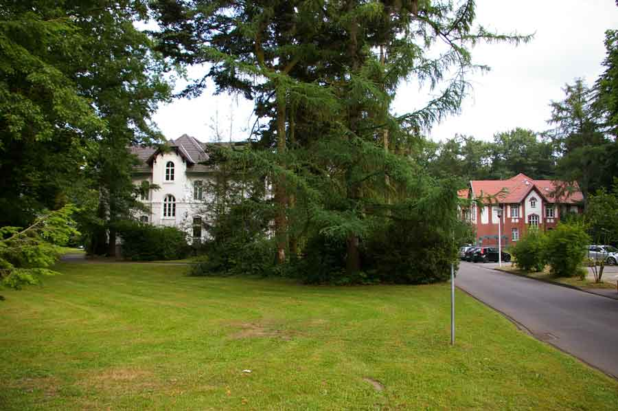 Galkhausen, Teilansicht